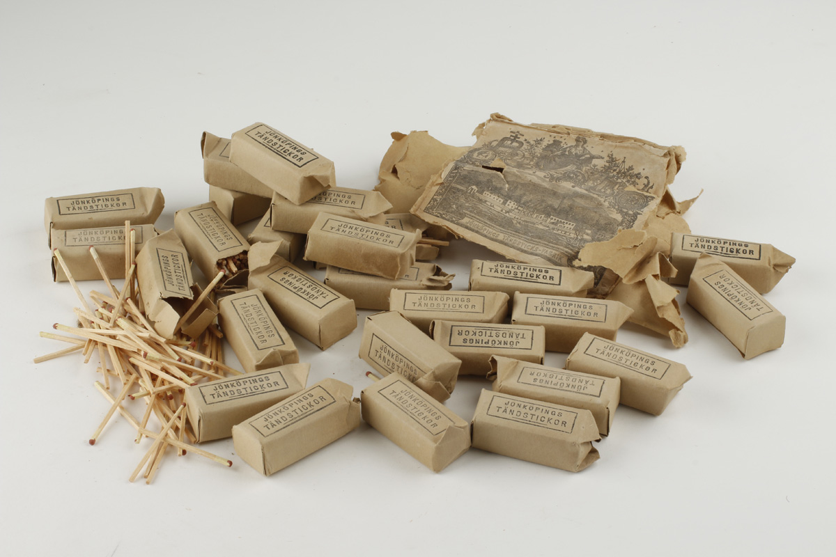 Trettiosju fosfortändstickor från Jönköpings tändsticksfabrik, som tillverkades under den senare delen av 1800-talet.